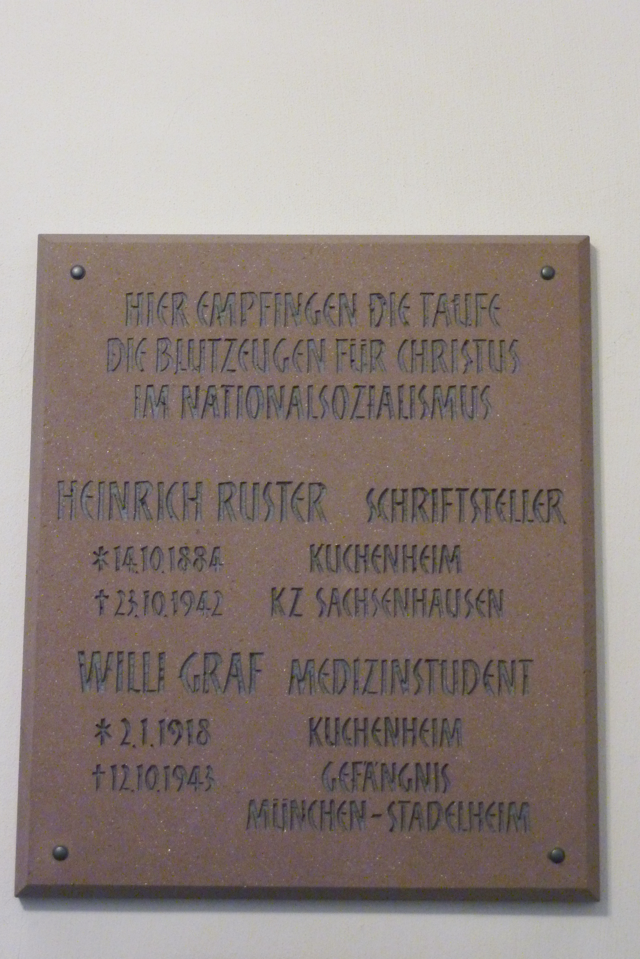 katholische Pfarrkirche St. Nikolaus in Kuchenheim, Gedenktafel in der Taufkapelle für Willi Graf und Heinrich Ruster